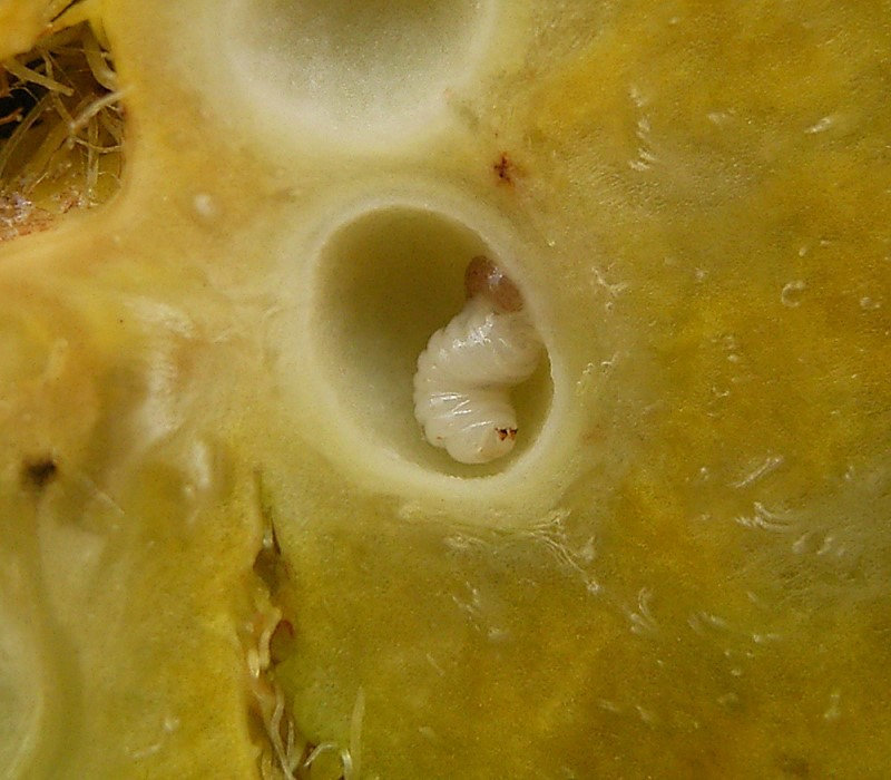 Diplolepis rosae on Rosa canina